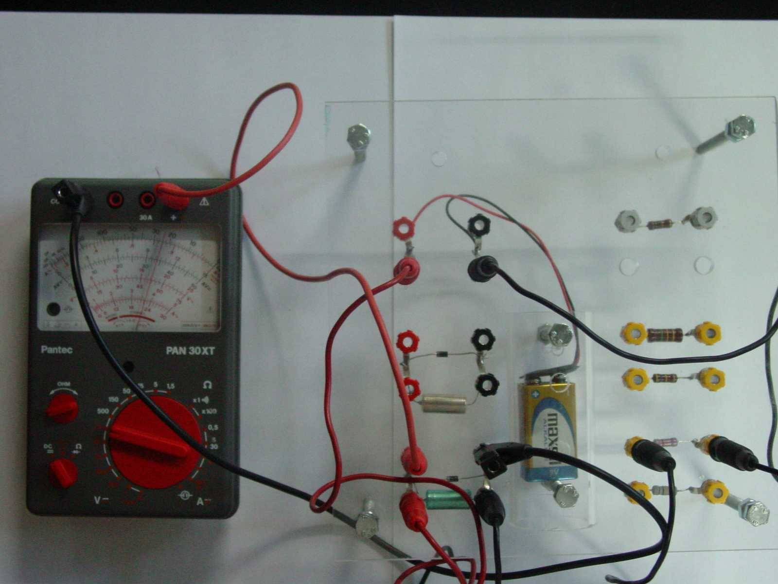 Circuito conectado a un polimetro